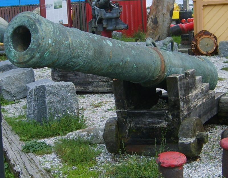 Bronzen scheepskanon, achttien ponds kogels, opgedoken door Duikteam Equador, Terschelling